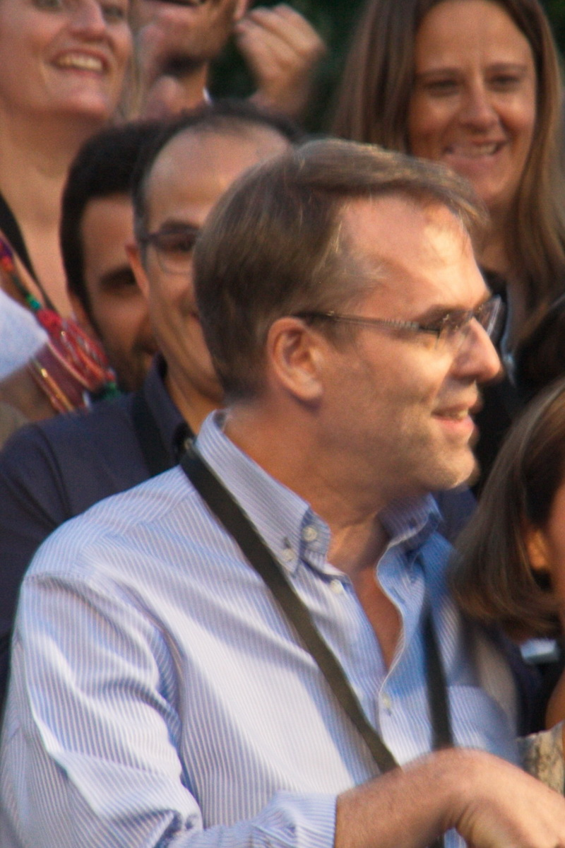 Acte de presentació de tots els candidats de la llista Junts pel Sí a Barcelona, al Psg.Lluís Companys. (28-8-2015)